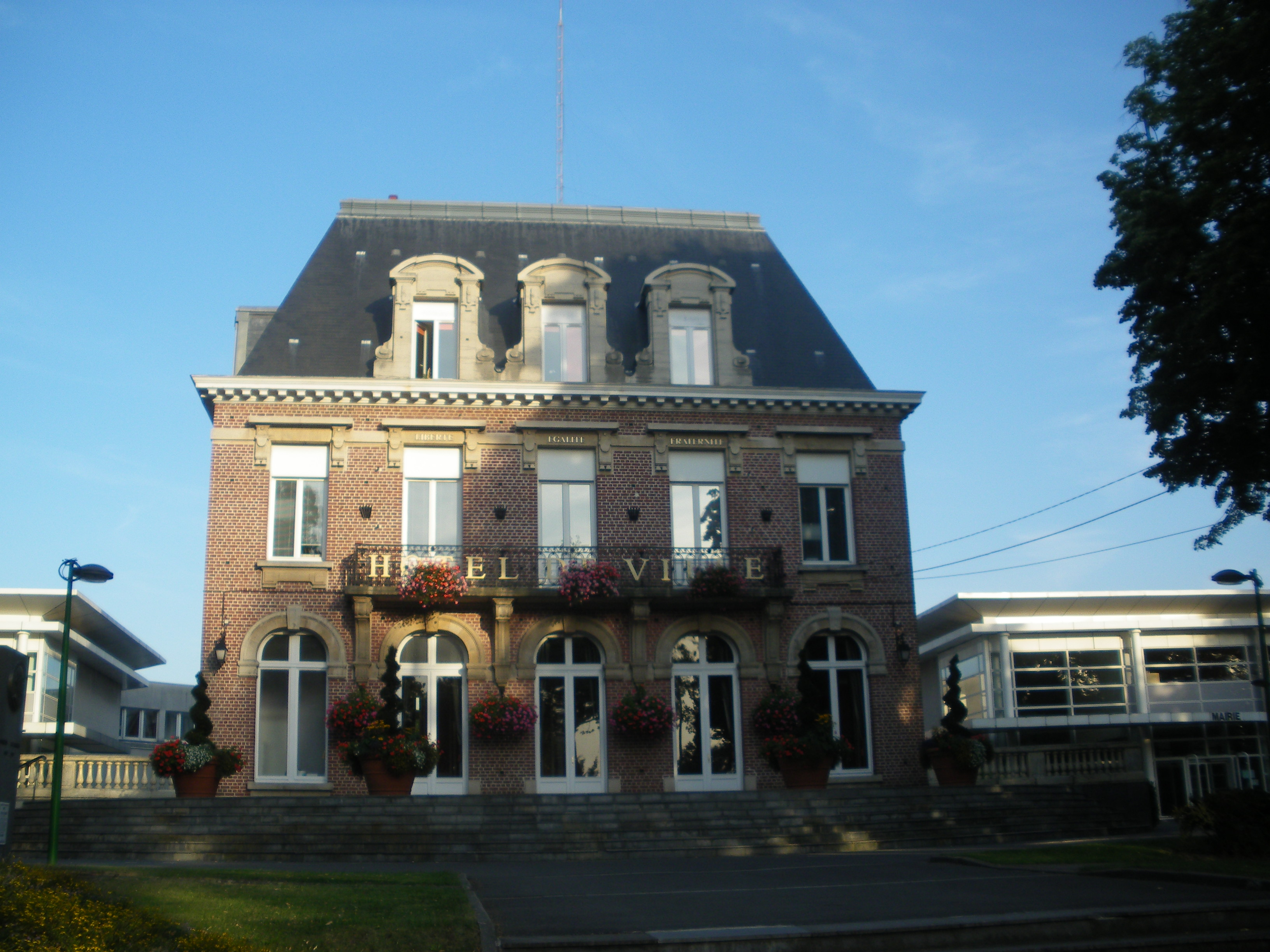 Vue de l'hôtel de ville de Mouvaux dans le département du Nord.